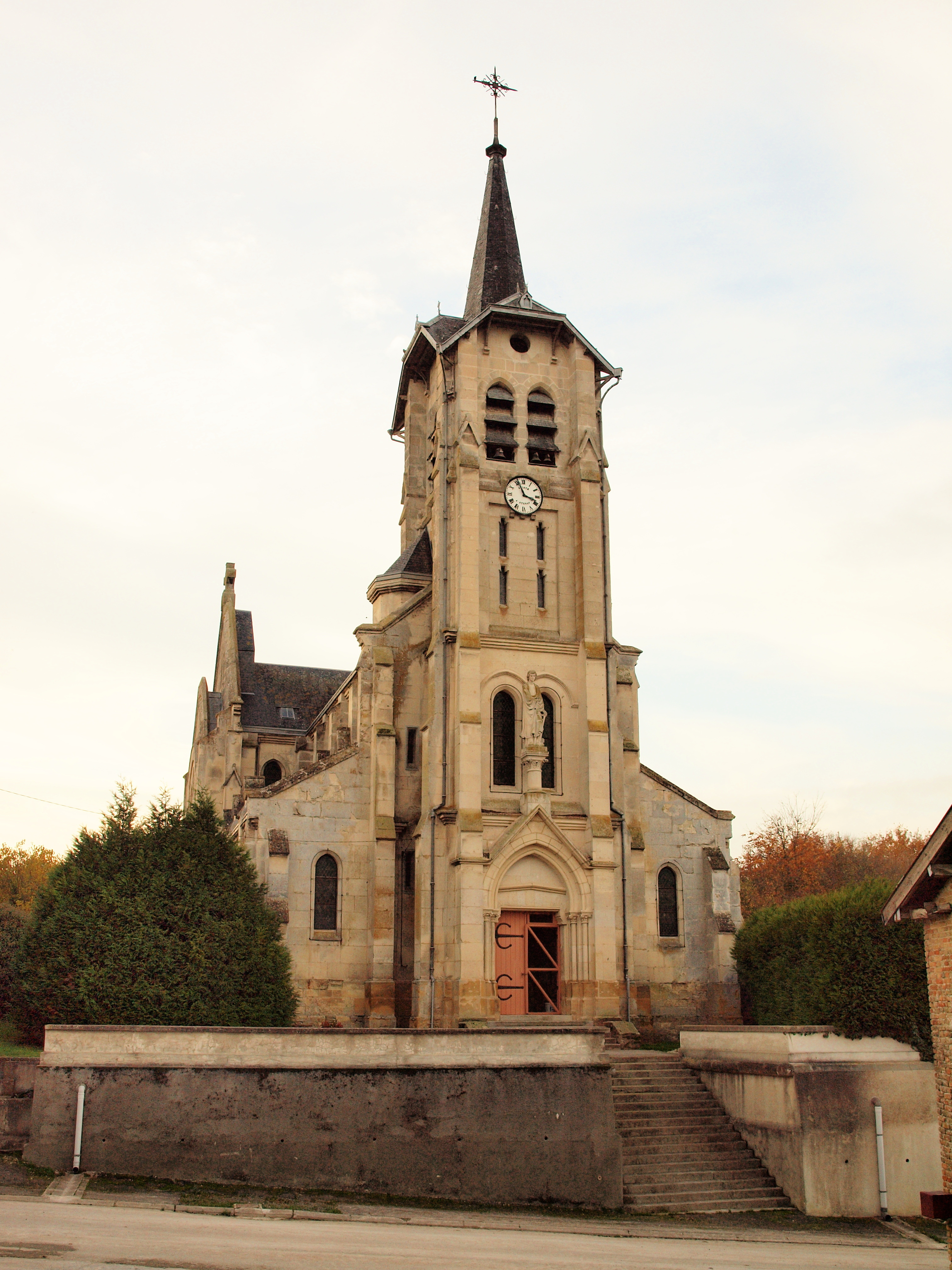 Mont-Laurent (Ardennes, France)